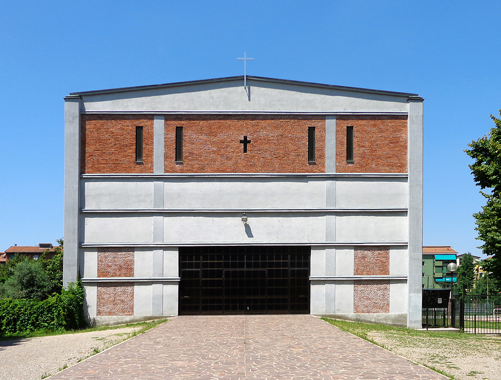 Milano, chiesa parrocchiale della Madonna dei Poveri, nel quartiere INA-Casa "Baggio II". Fu costruita dal 1952 al 1954 su progetto di Luigi Figini e Gino Pollini.